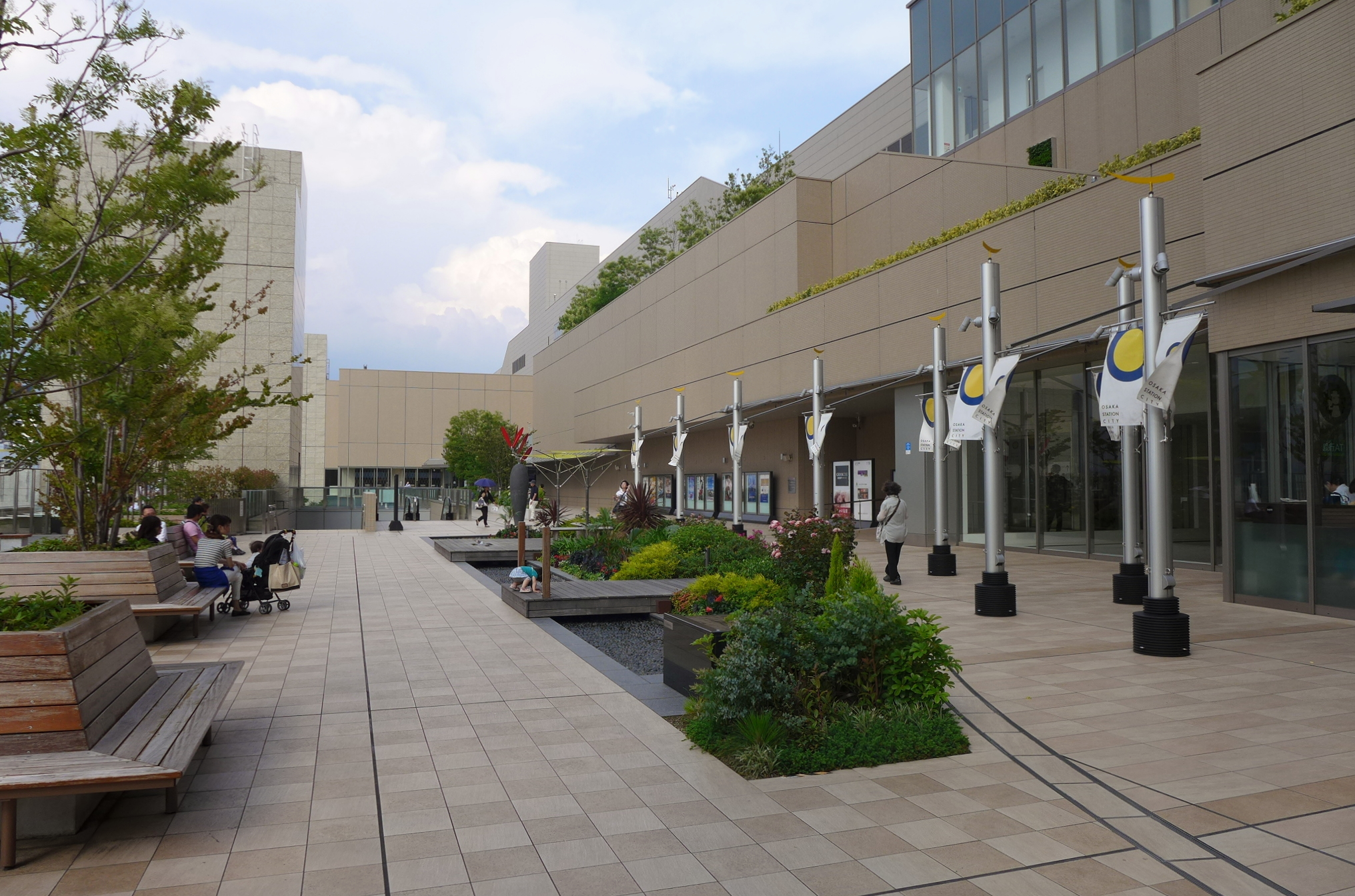 Osaka Station City Kaze-no-hiroba Plaza